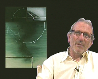 Portrait de Alain Lestié